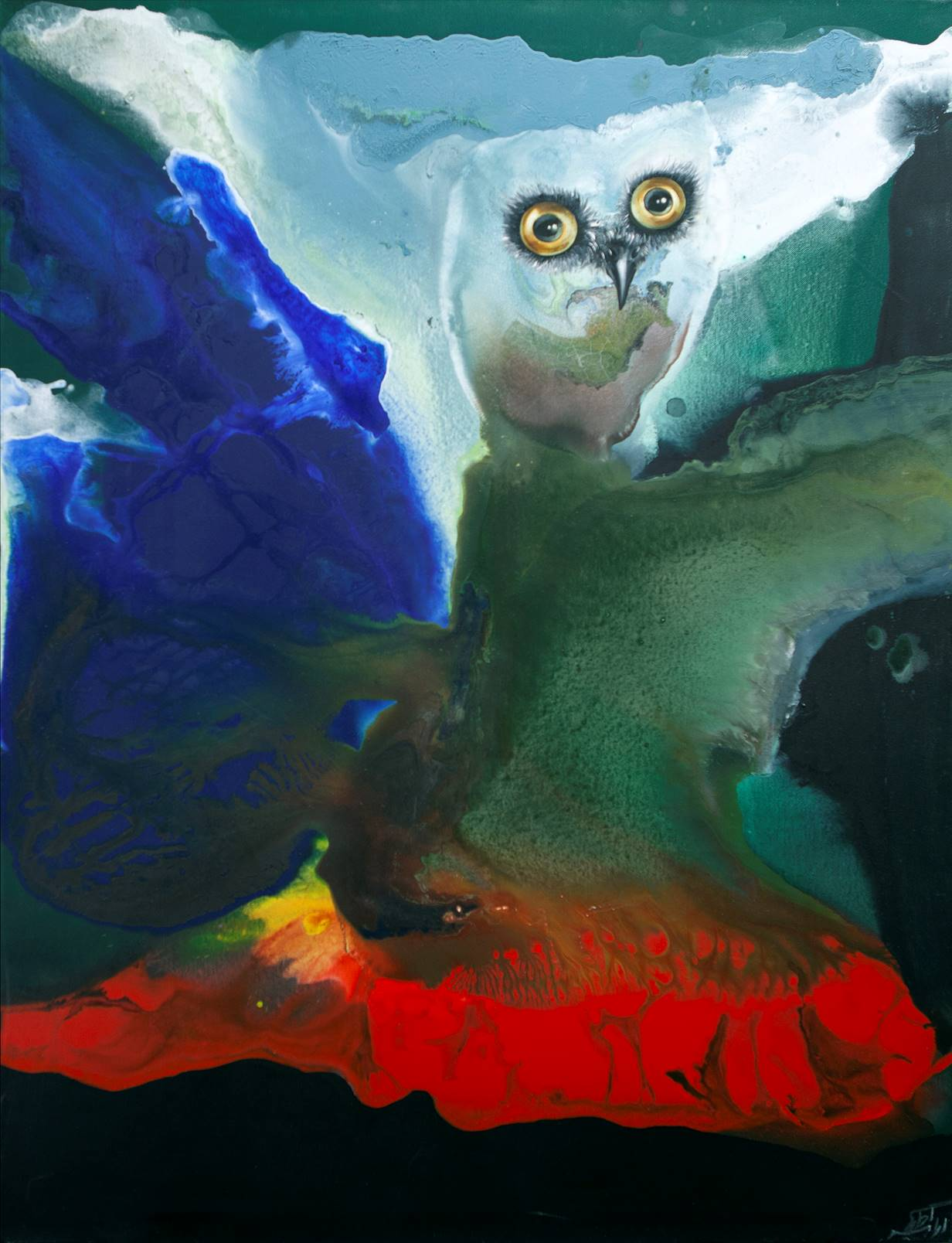 Ebrahim Ehrari, Eule, 2018, Öl und Acryl auf Leinwand, 100x75 cm